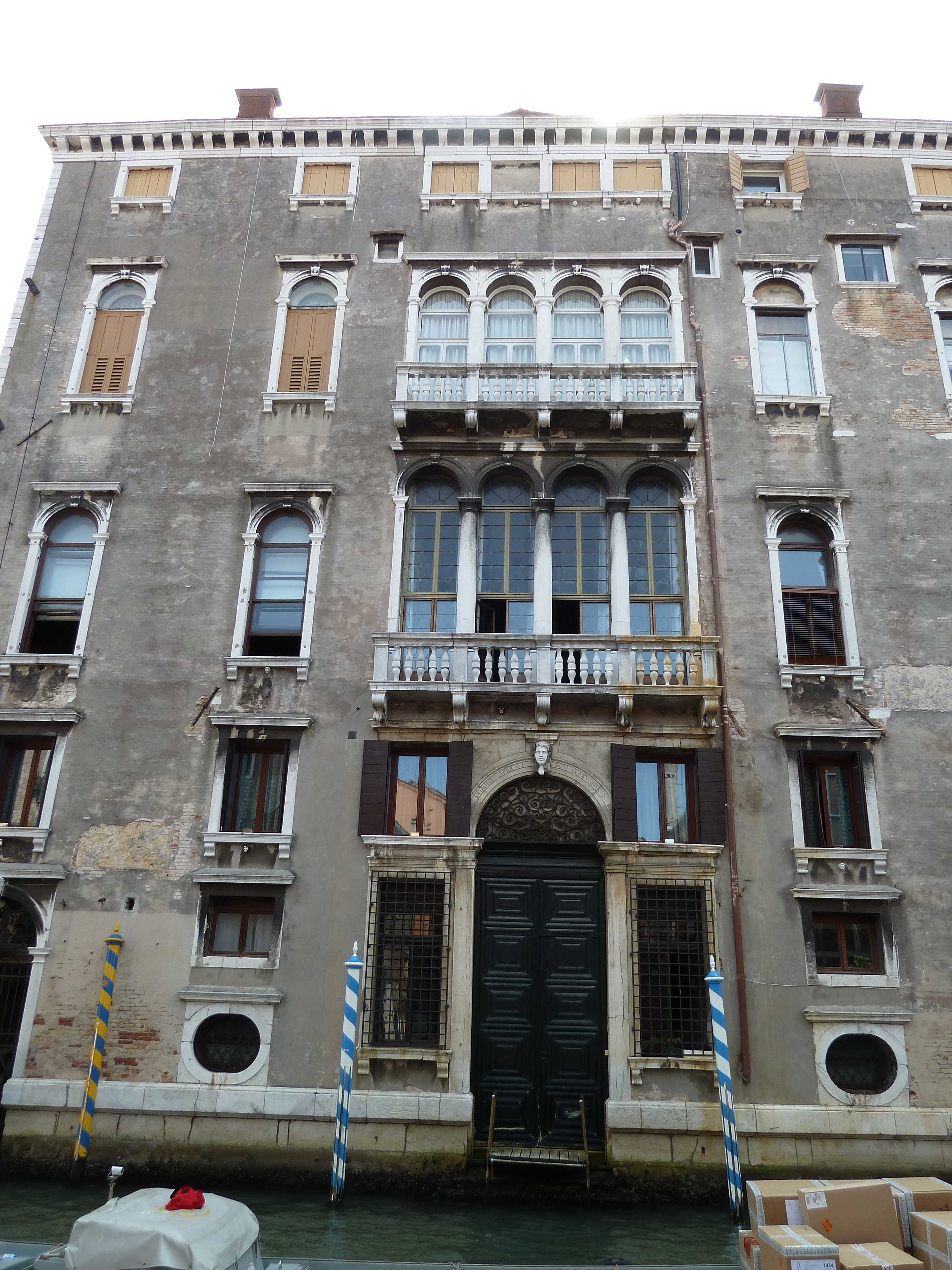 Pal barbarigo d terrazza